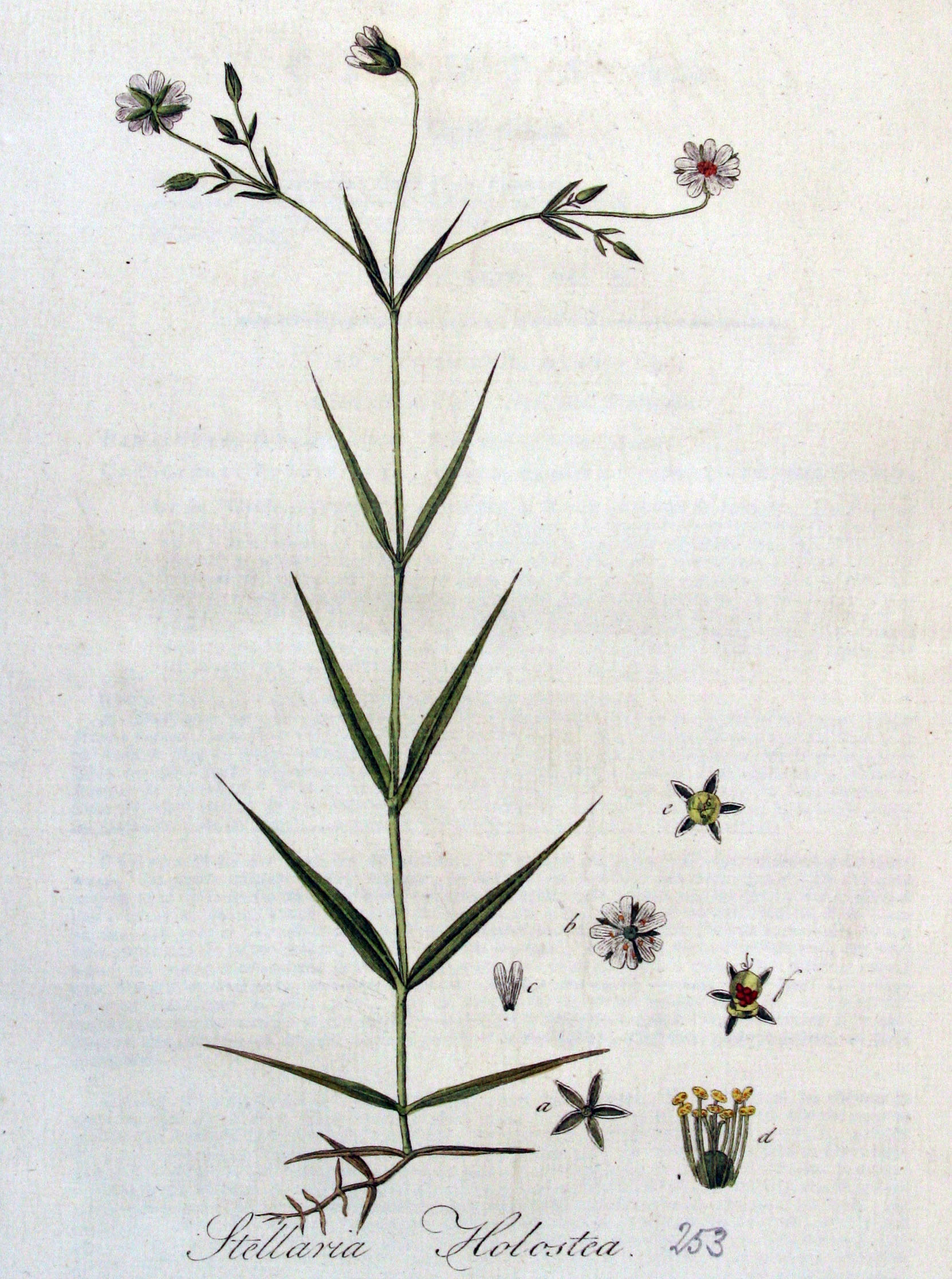 Stellaria holostea L.